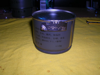 戦闘糧食 I型 添付の缶切り